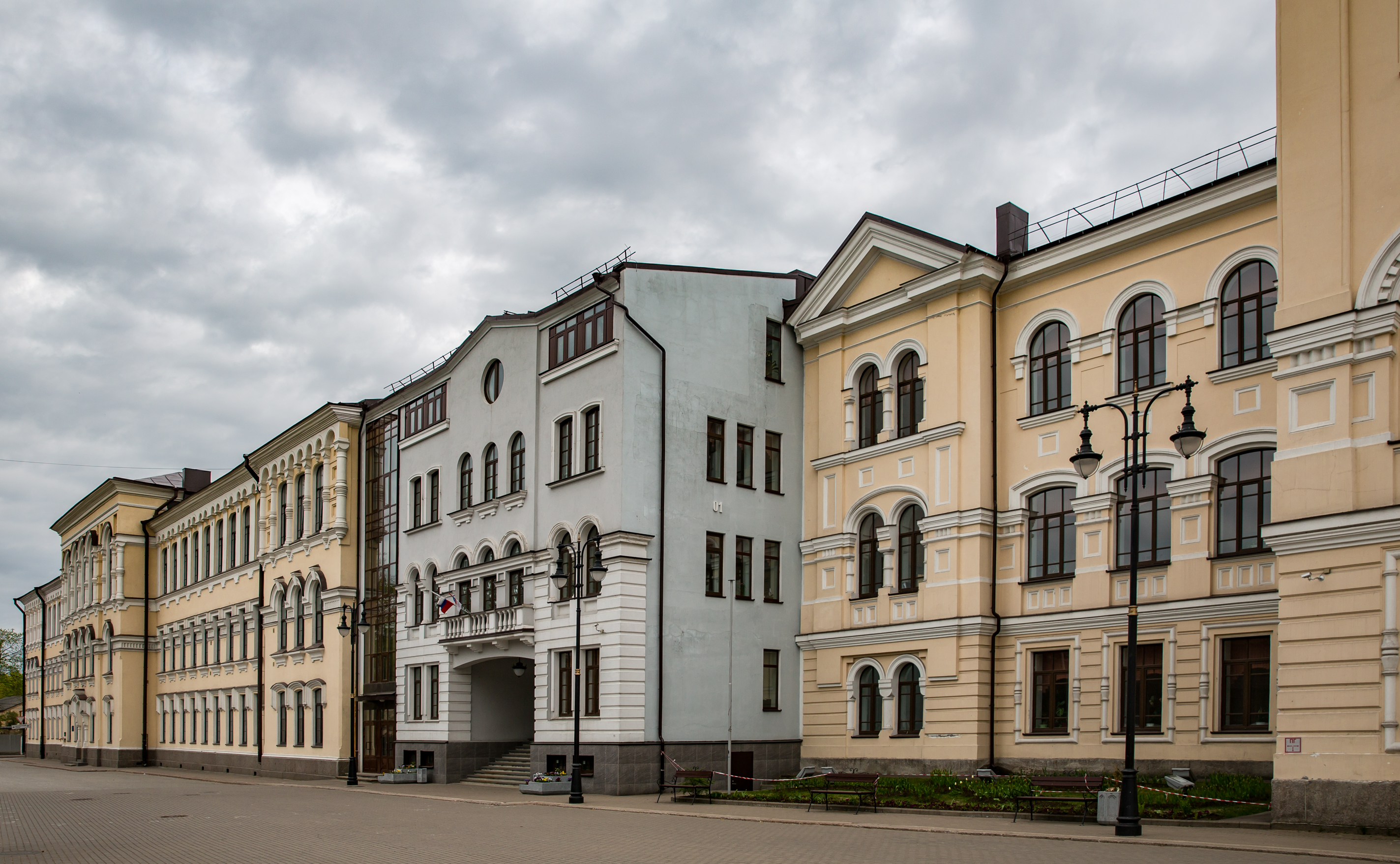 Vyborg, Karelian Isthmus, Russia Karelian Isthmus was part of Finland before the WW2. After the war it was ceded to Soviet Union. These buildings are from the Finnish period and they are designed by Finnish architects. Some of them have been repaired, but some are in poor condition. Viipurin suomalainen lyseo (vas.), Hovioikeudenkatu. VirtuaaliViipuri: Koulurakennus rakennettiin vuosina 1883-85, pietarilaisen arkkitehti N.A.Courvoisierin laatimien suunnitelmien mukaan, venäläiseksi siviililukioksi. Se korotettiin kolmikerroksiseksi vuosina 1906-10 arkkitehti A.P.Maksimovin suunnittelemana.